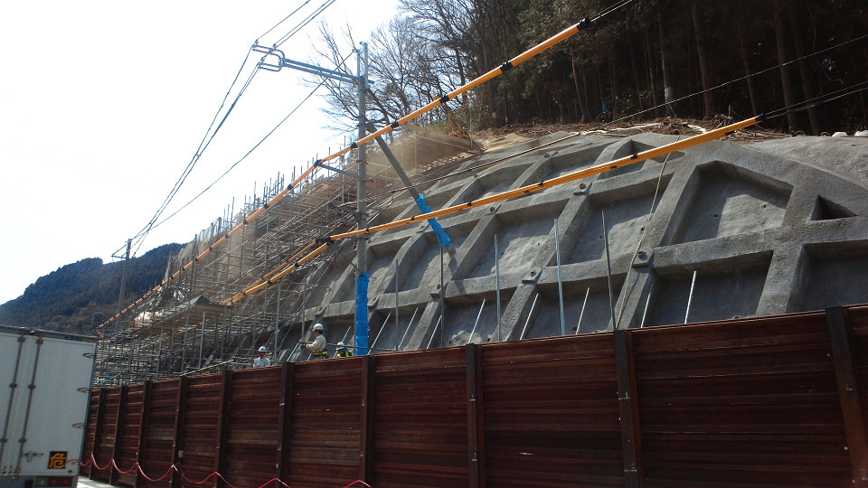 国道371号の斜面崩落現場（大阪府河内長野市 紀見トンネル前）